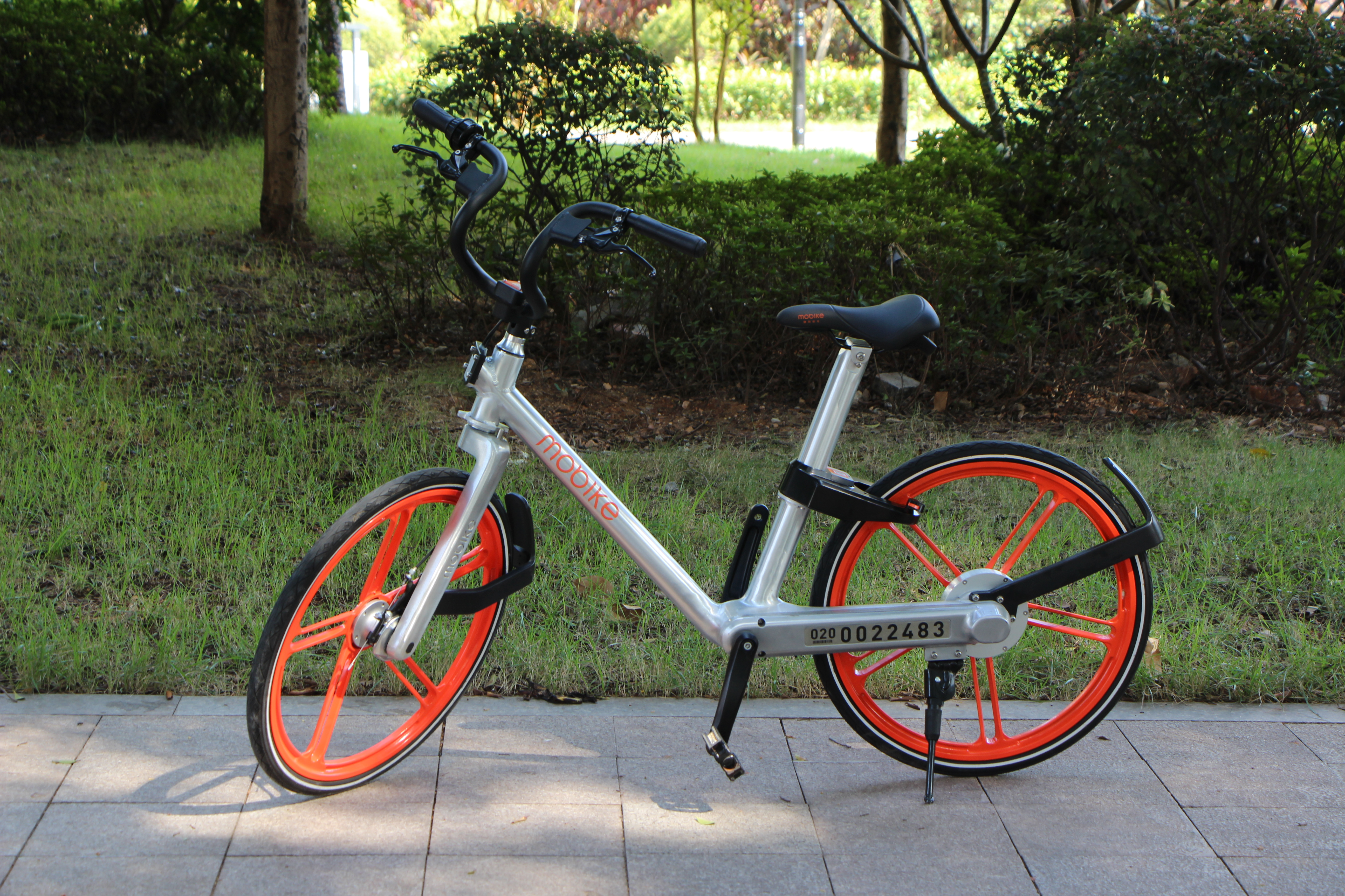 摩拜单车普通版